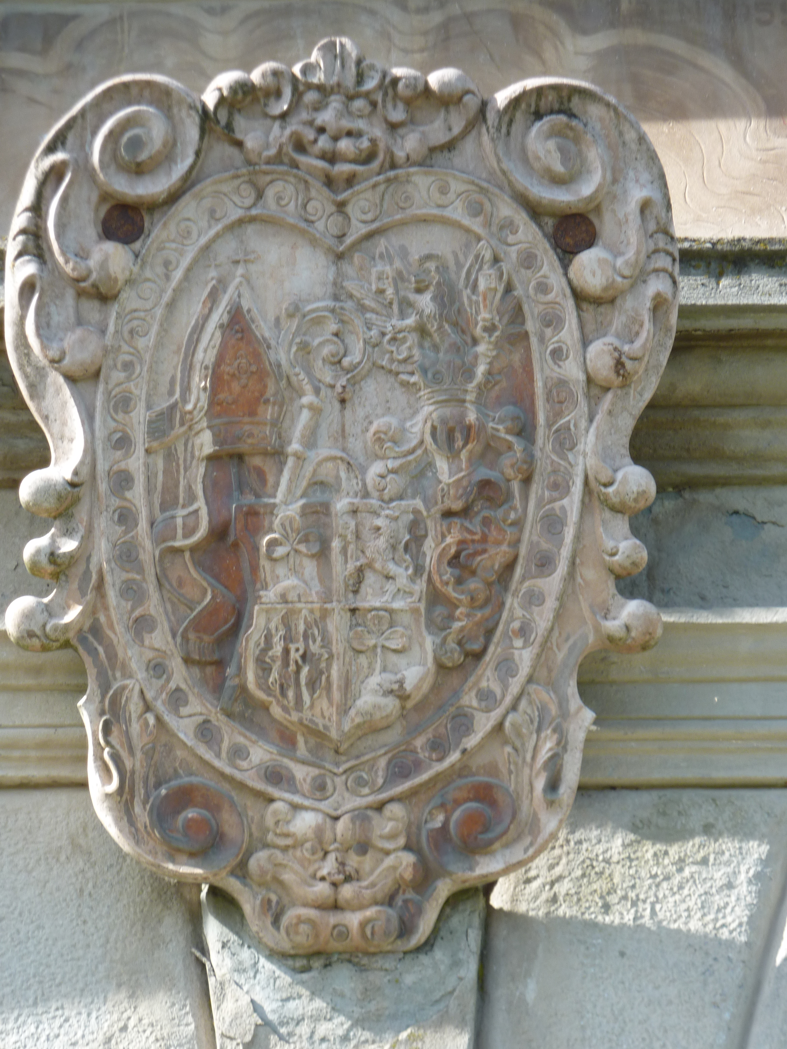 Ehem. Benediktinerstift Gleink, Gleinker Hauptstr. 20, Steyr-Gleink, Oberösterreich - Wappen von Abt Rupert von Kimpflern über der Südeinfahrt